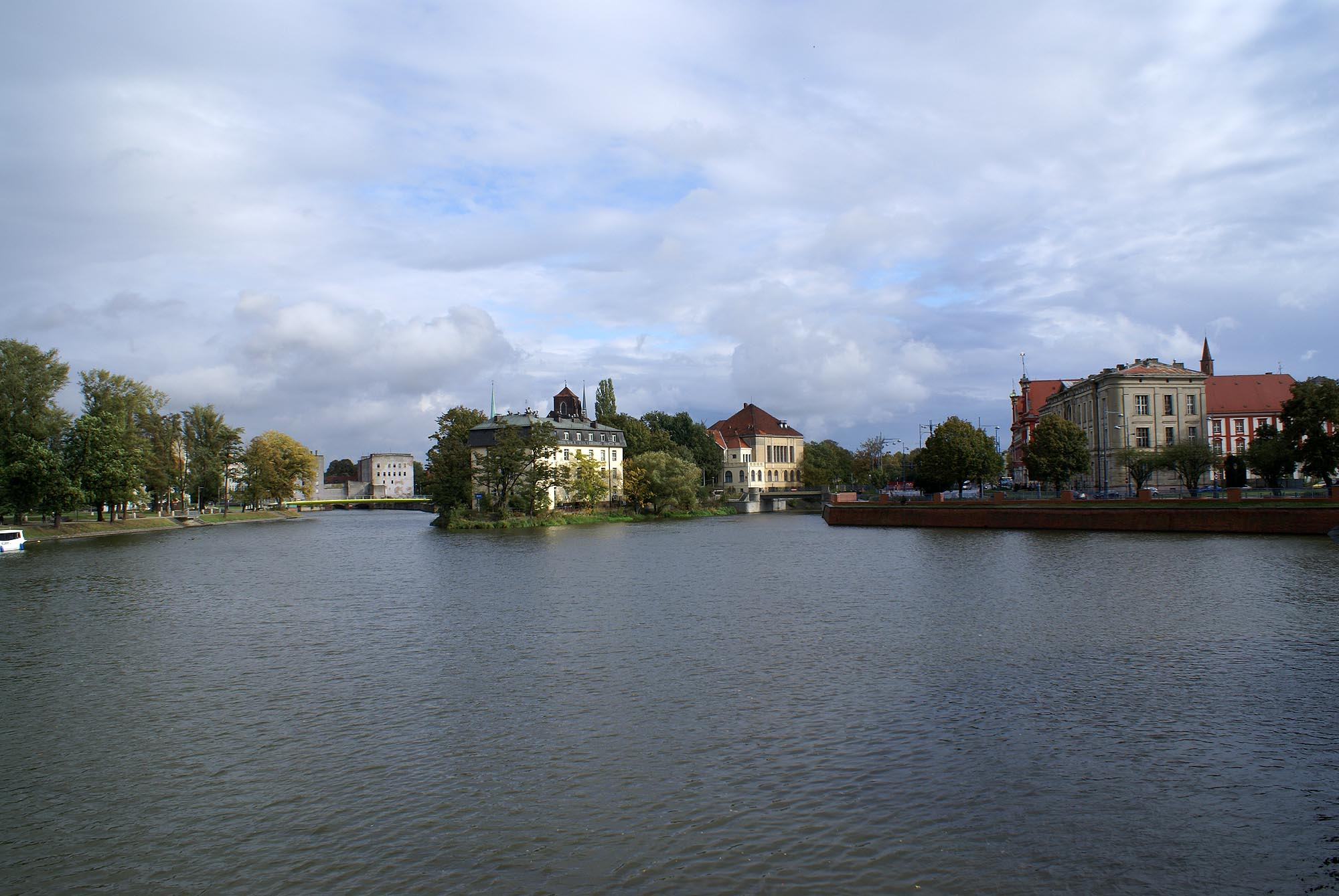 Wrocław, zespół urbanistyczny Ostrowia Tumskiego i wysp: Piaskowej, Bielarskiej, Słodowej